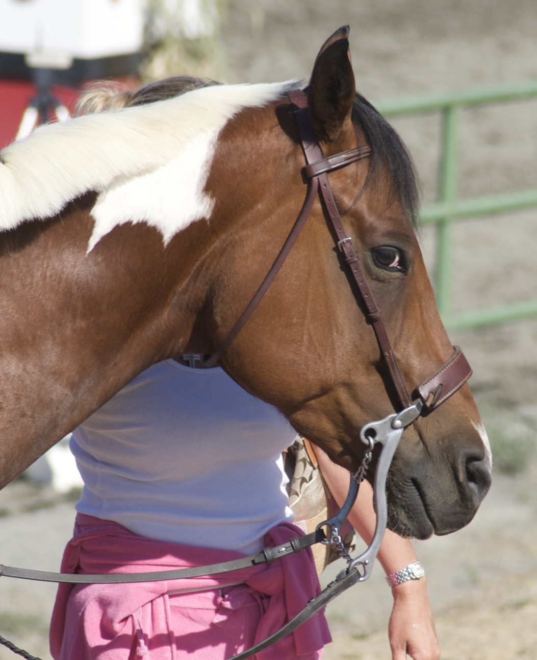 Hackamore